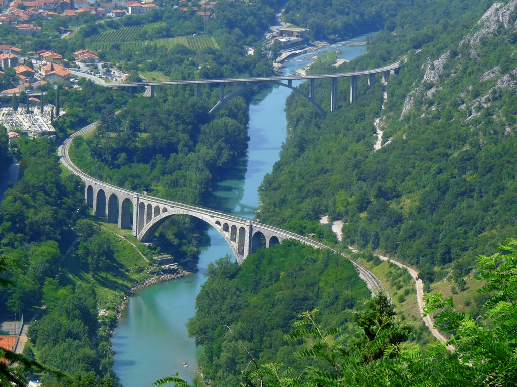 Solkanski most čez Sočo